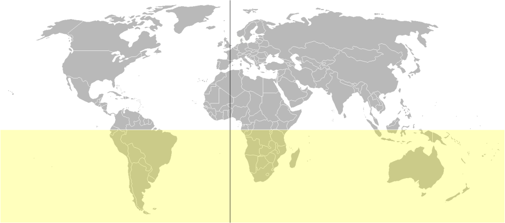 Baseado en